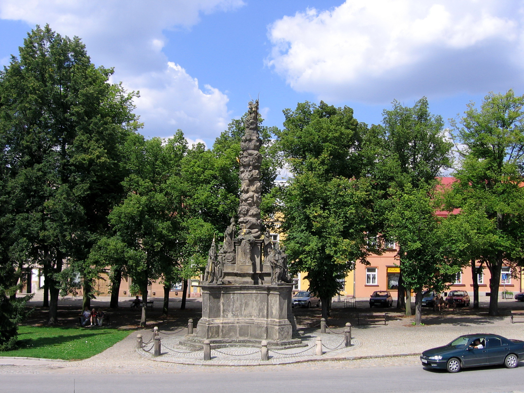 Polná, barokní sousoší Nejsvětější Trojice – morový sloup z dílny V. V. Morávka nacházející se na Husově náměstí, pochází z roku 1750